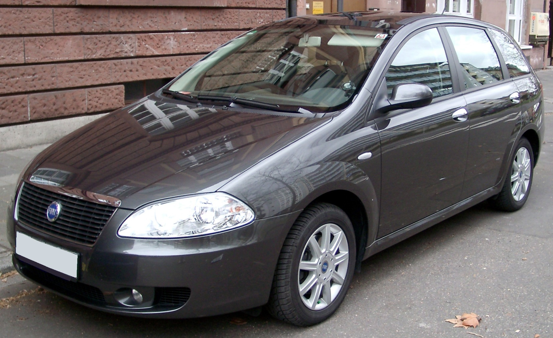 Fiat Croma (seit 2005)